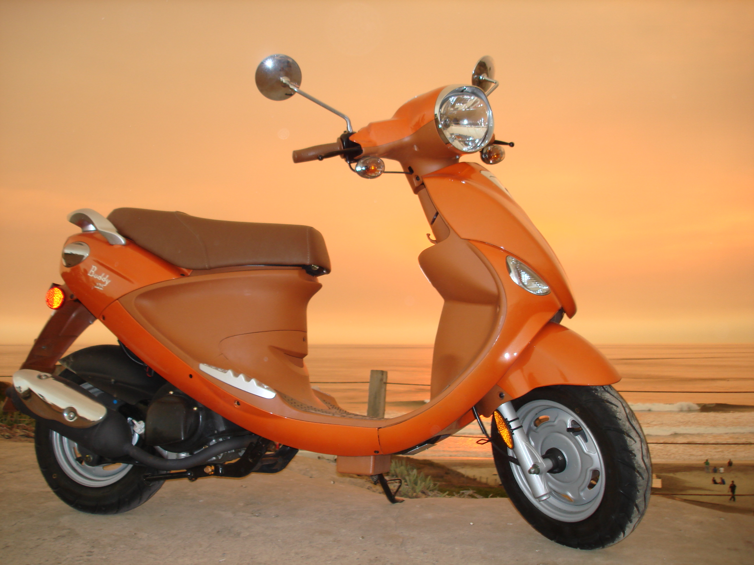 Genuine Buddy